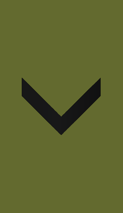 Distinksjoner Visekorporal